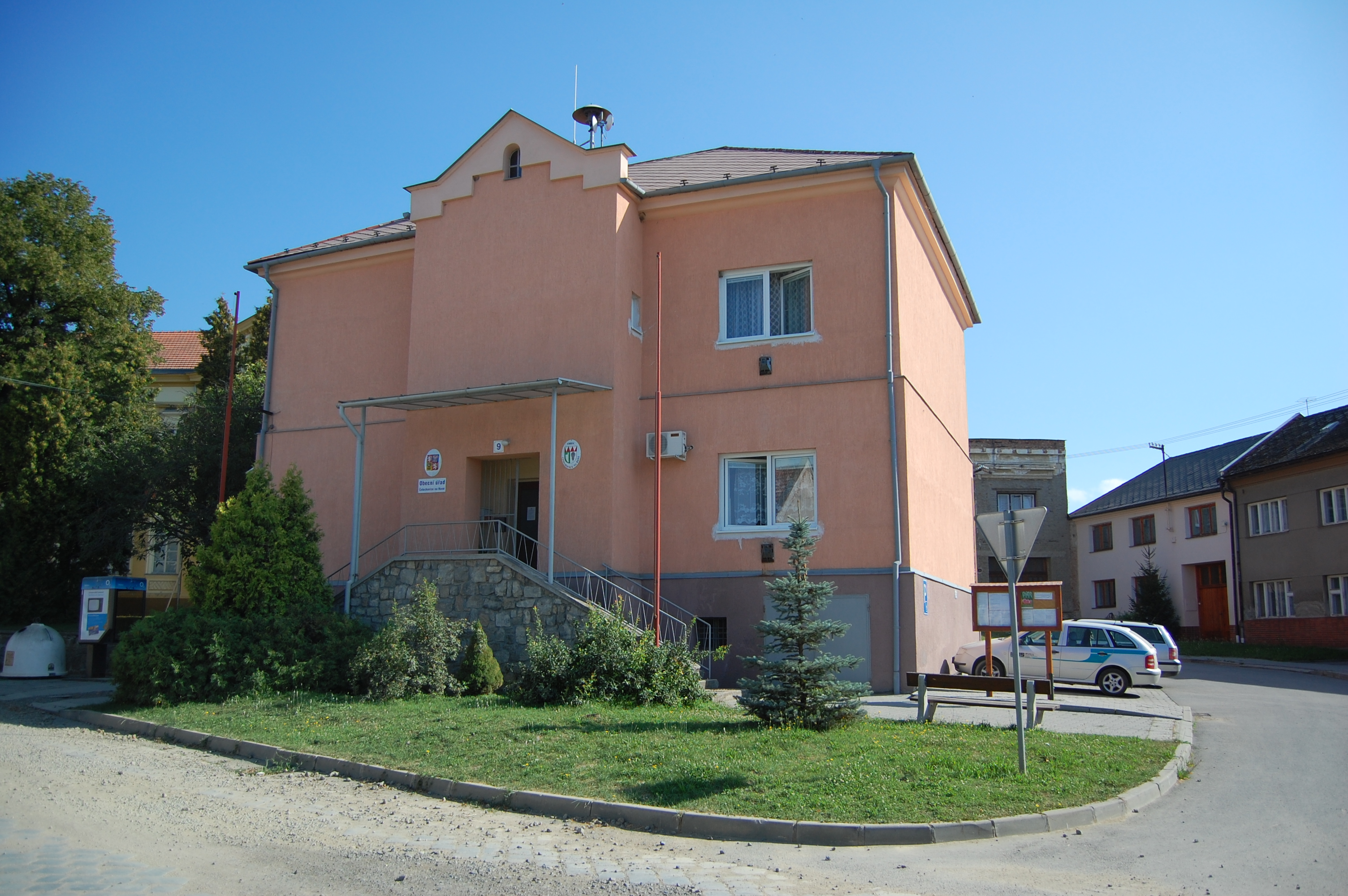 Obecní úřad, Čelechovice na Hané, okres Prostějov